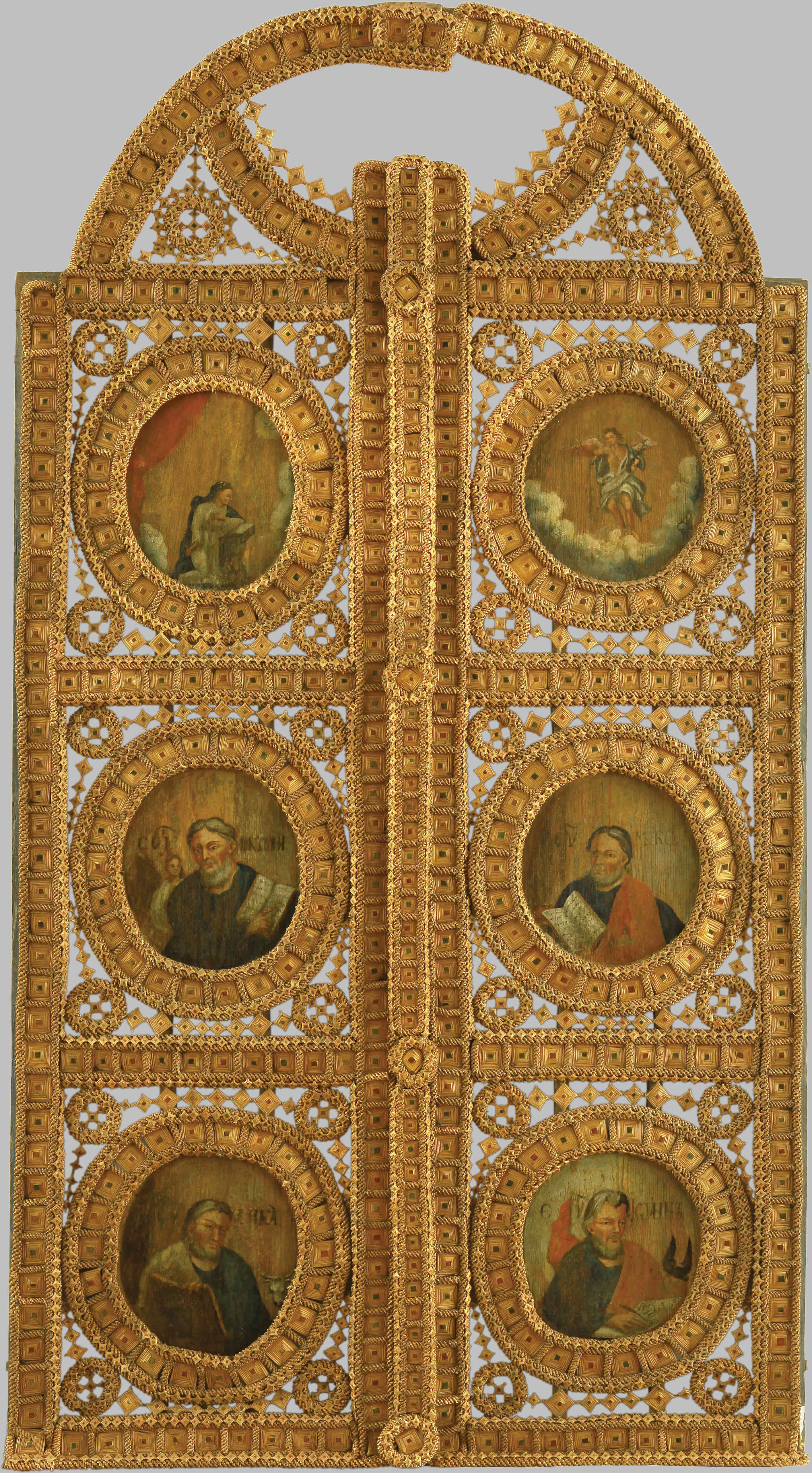 225×120×5 см